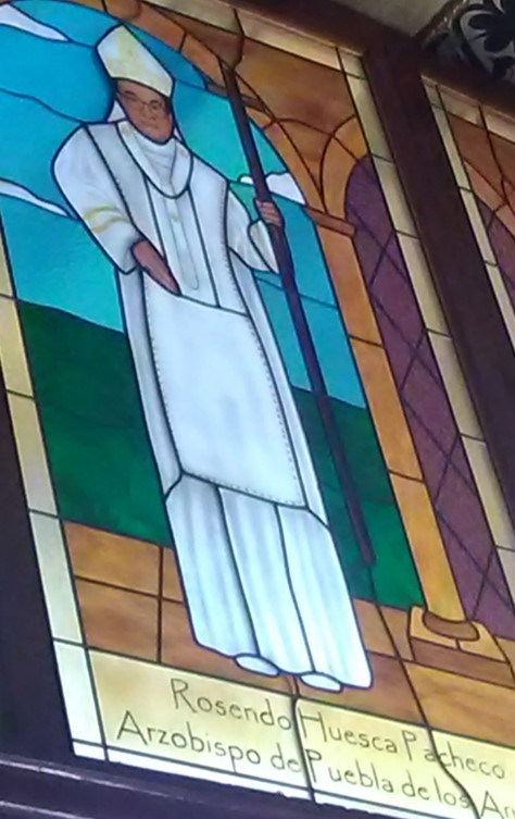 Vitral de Mons. Rosendo Huesca Pacheco en la Parroquia de San Martín Texmelucan